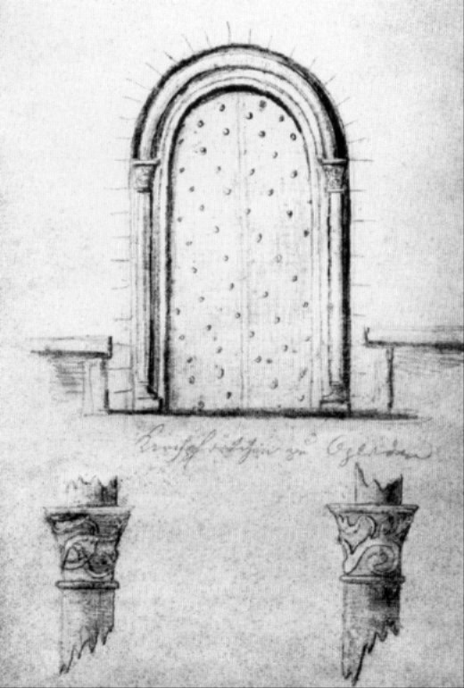 "Kirchpförtlein zu Opladen" von Anton Wilhelm von Zuccalmaglio (1803-1869). Zeigt das Portal der ersten St.-Remigius-Kirche in Opladen (jetzt Leverkusen), erbaut vermutlich um 1200.